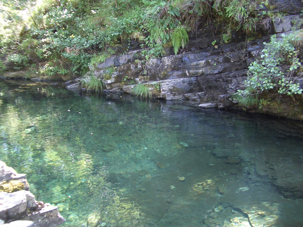 Río burbia a su paso por Burbia